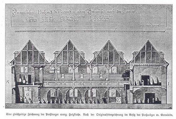 Das Gebäude stand auf der Stelle der heutigen 'Kleinen Kirche' auf der Nonnenbahn.